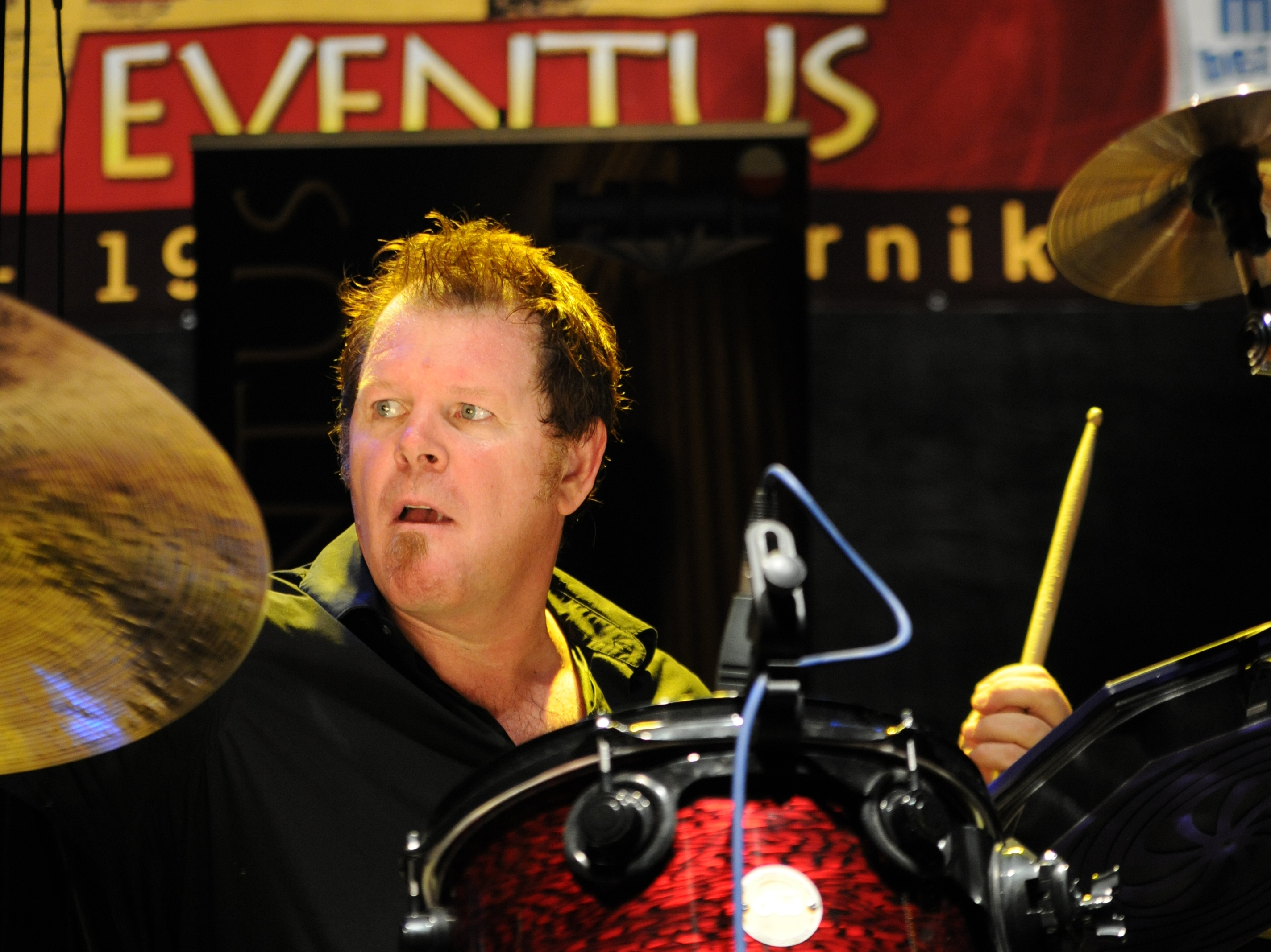 Pat Mastelotto